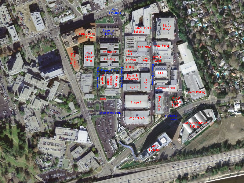 Photo aérienne des Studios Disney à Burbank, au nord de Los Angeles. Photo aérienne USGS de 1999, modifiée par mes soins pour avoir le nom des batiments et des voies.